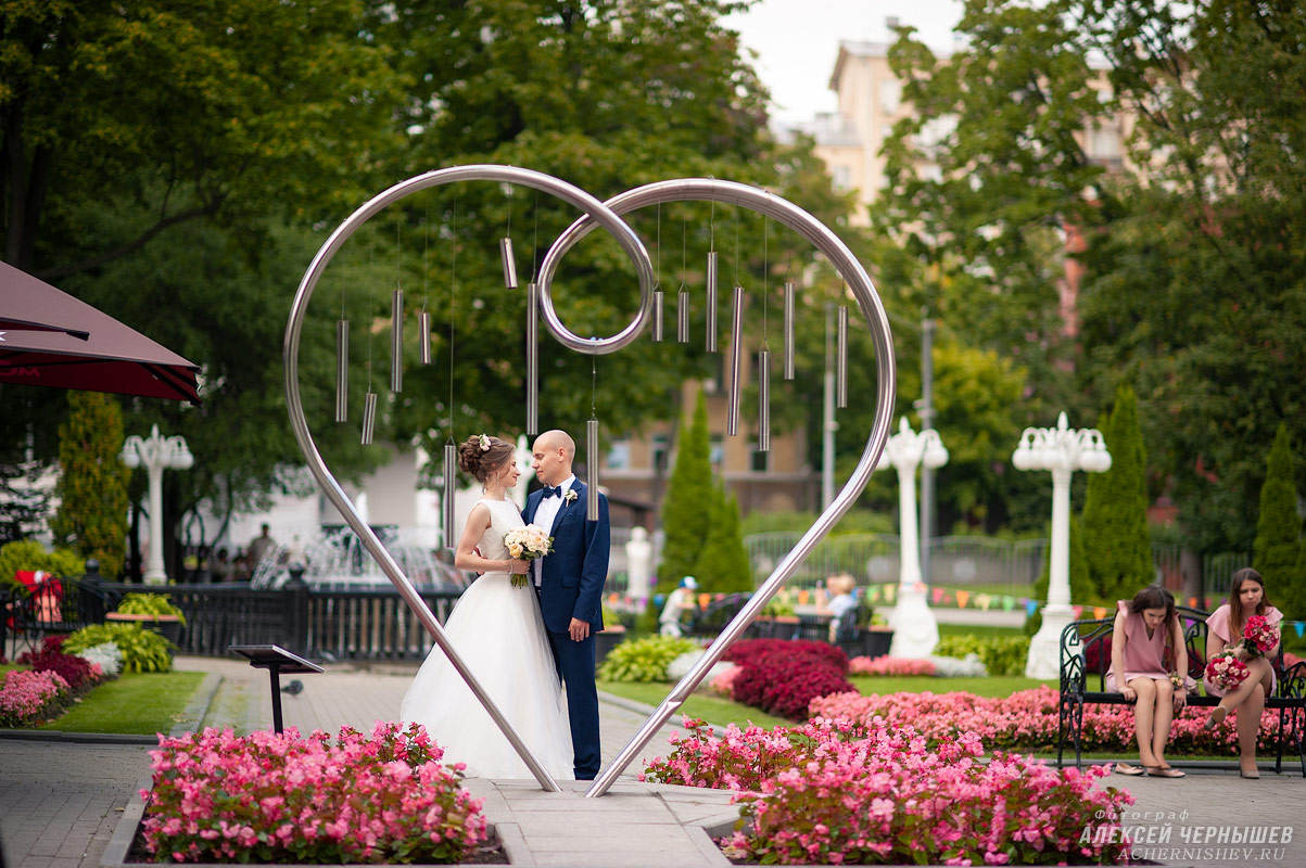 Арка в форме сердца в саду Эрмитаж